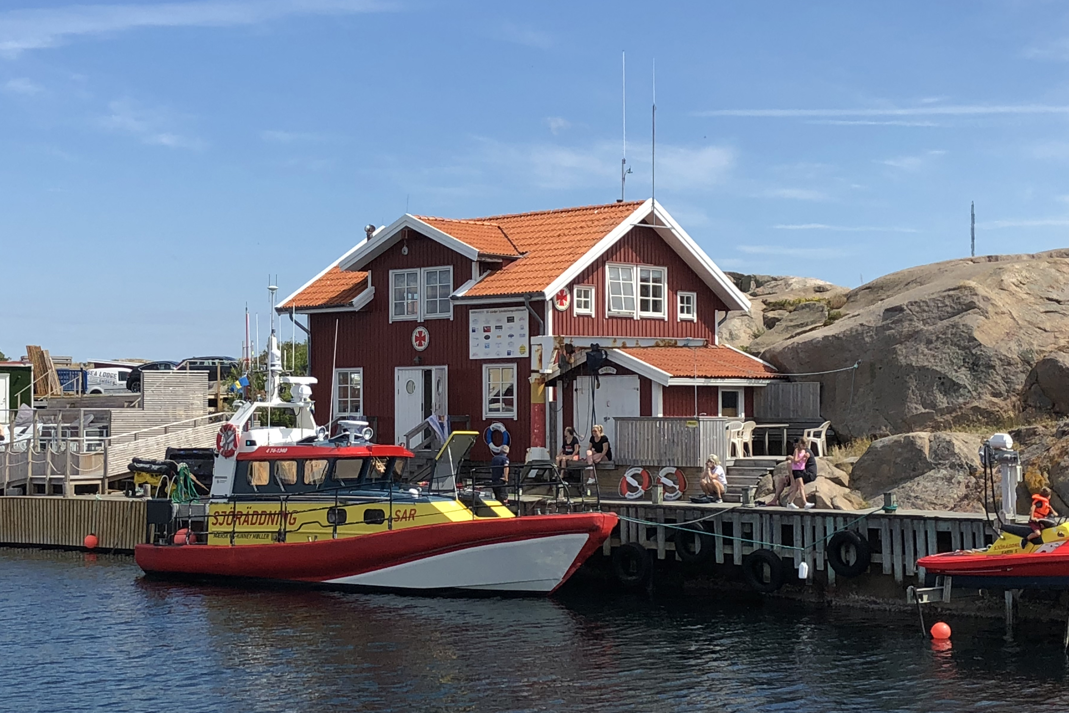 Räddningsstation Smögen 2018